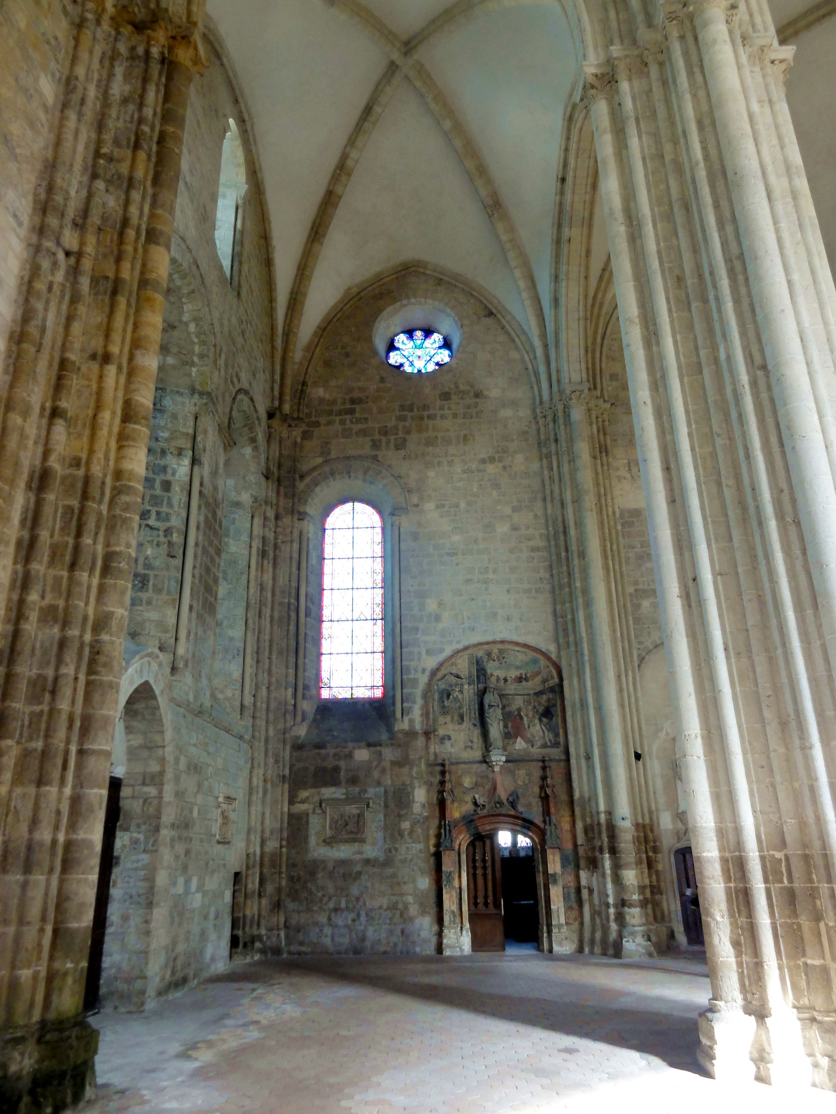 Croisée, vue vers le nord.